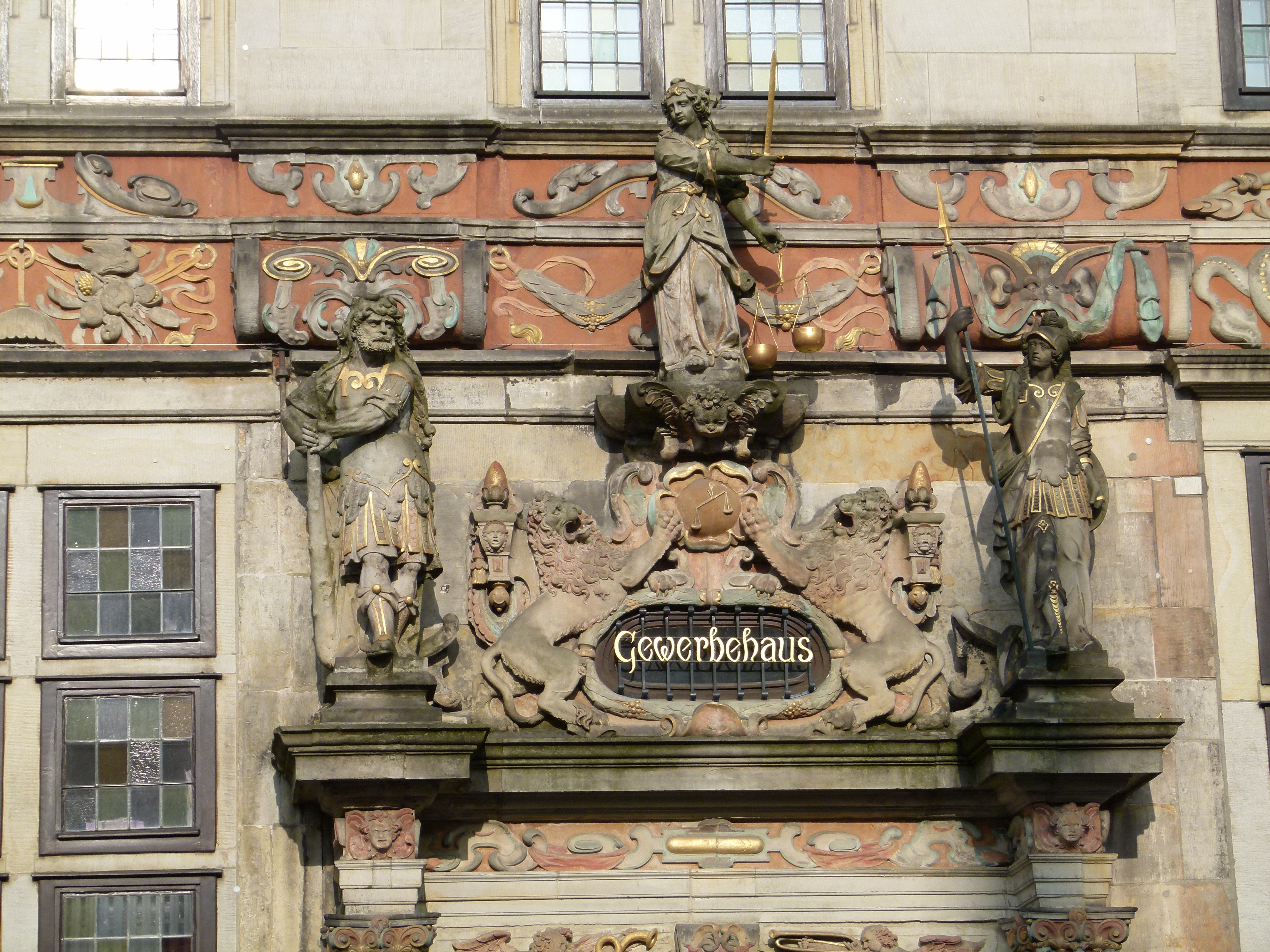 Gewerbehaus, Bremen-Mitte